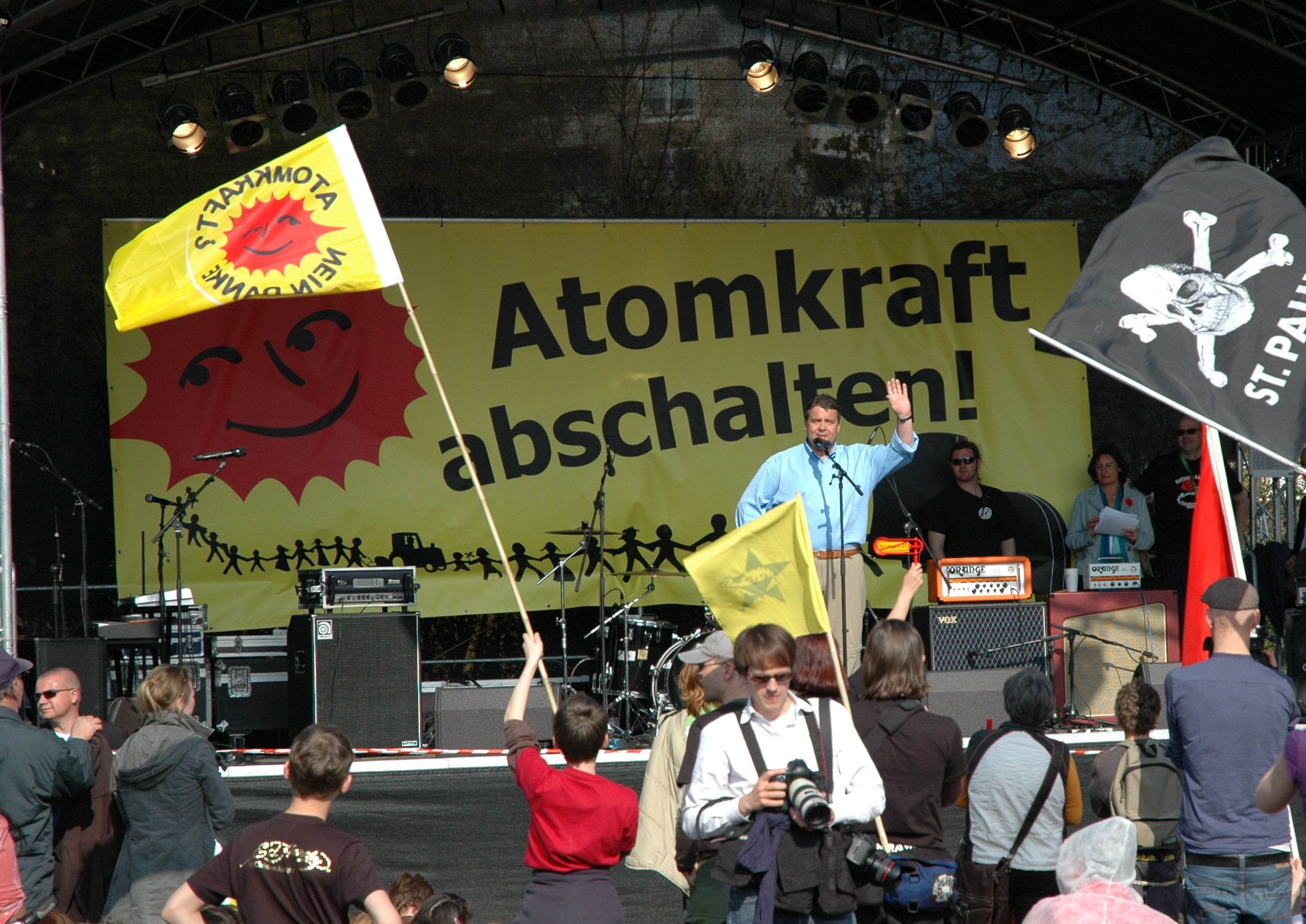 Sigmar Gabriel bei der Kundgebung zur KettenreAktion in Elmshorn am 24. April 2010